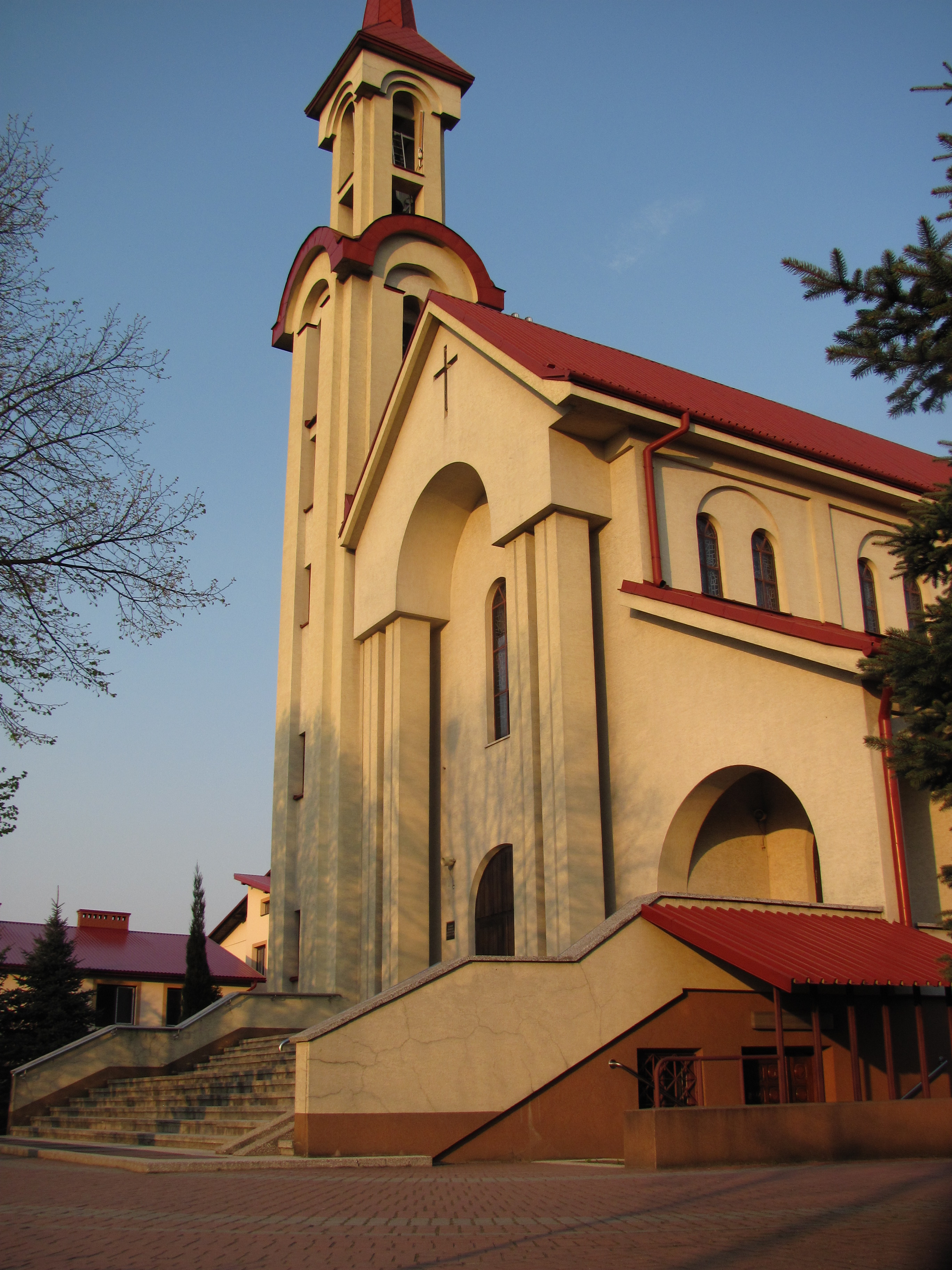 Kościół NSPJ